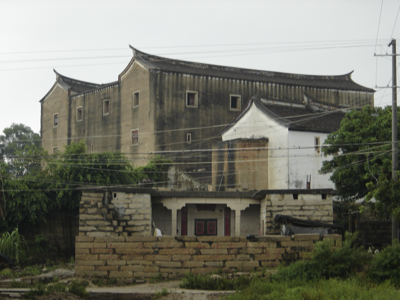 自拍